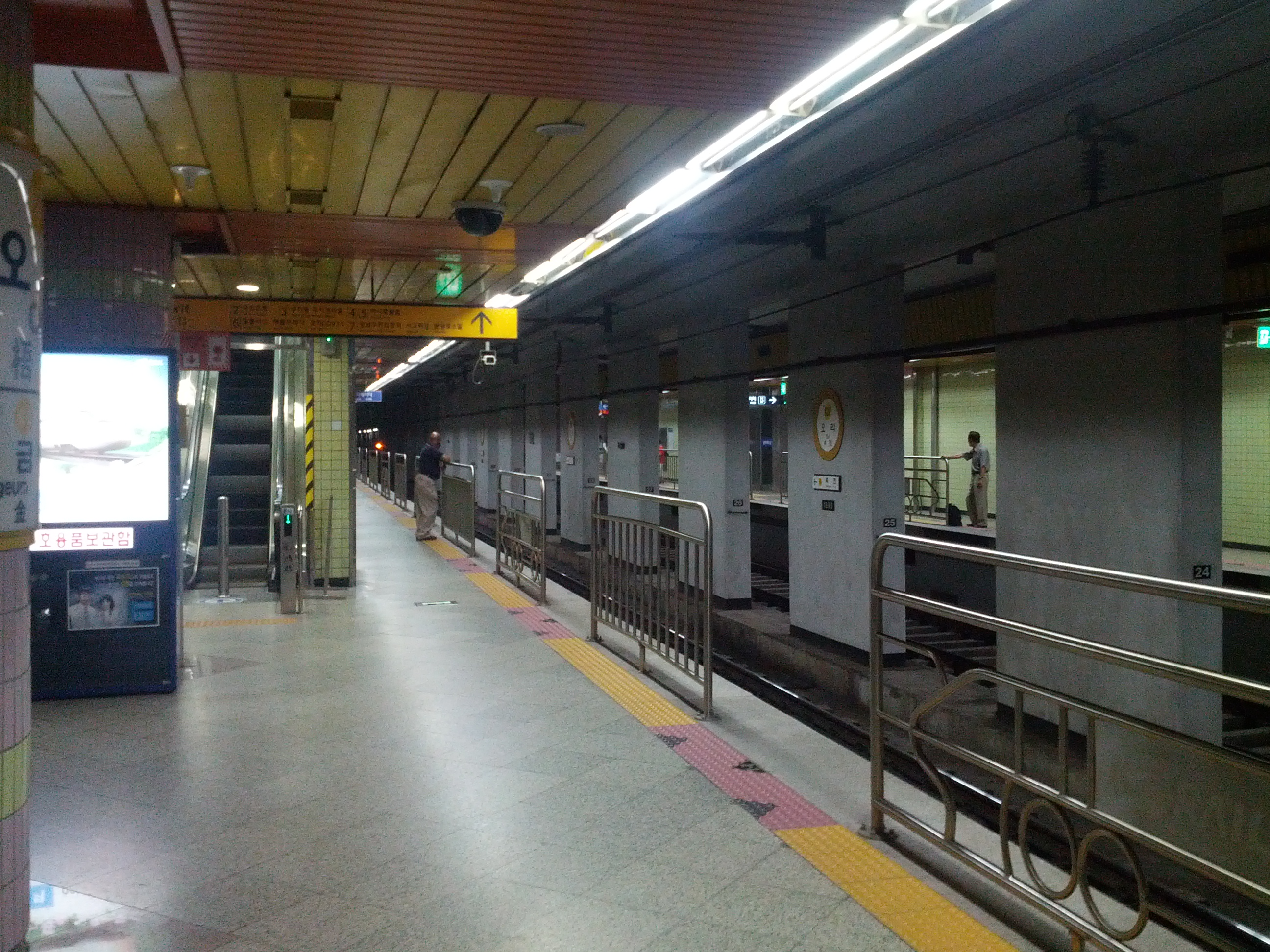 오리역 승강장